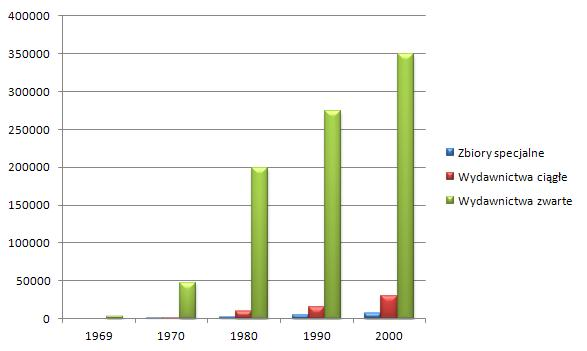 Struktura zbiorów biblioteki UJK w wybranych latach XX wieku. Źródło: Drążyk J., Suchojad H., Biblioteka Główna, w: Droga do uniwersytetu (1969–2009), pod red. W. Cabana i M. B. Markowskiego, Kielce 2009, s. 231.